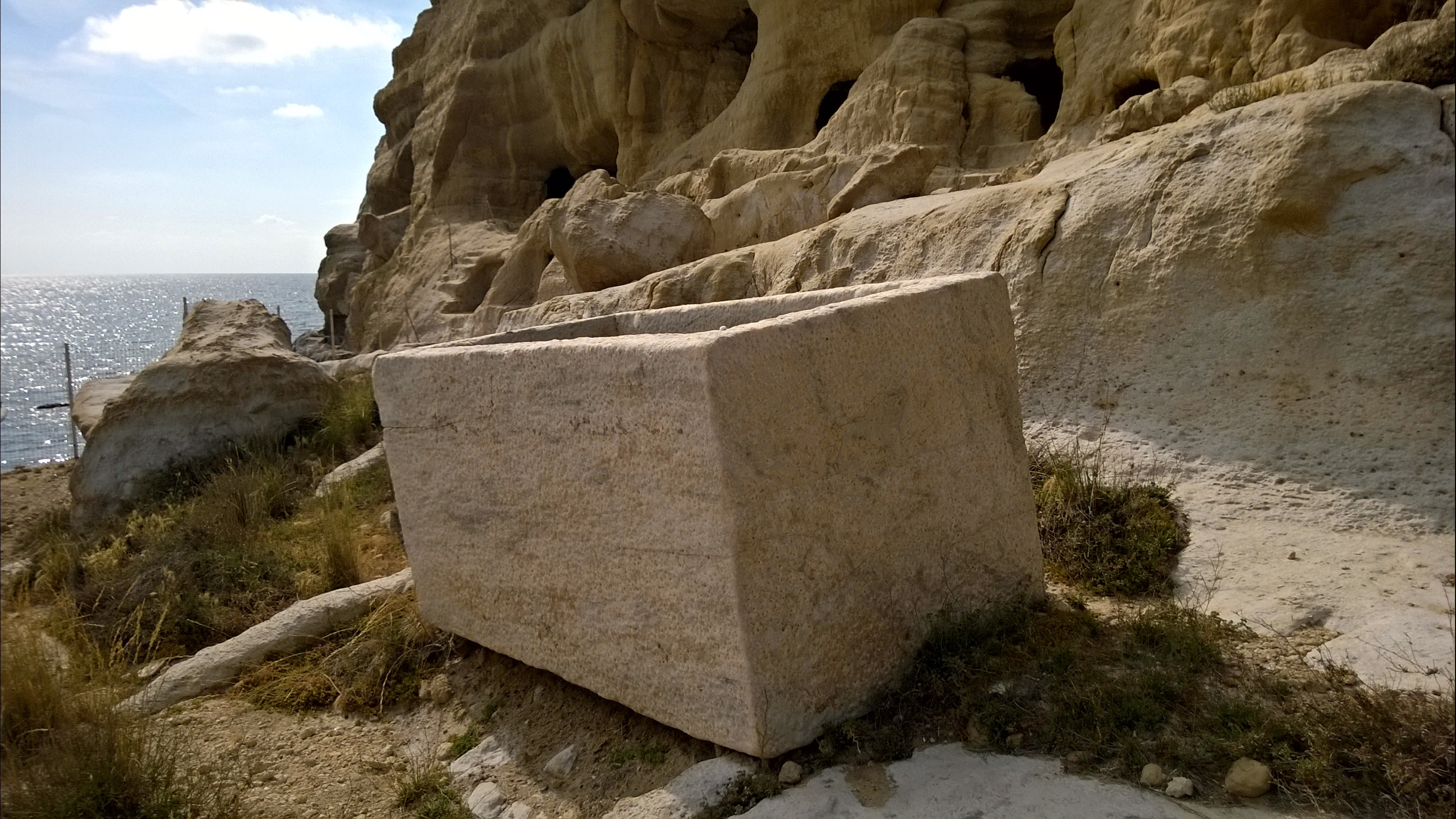 Matala